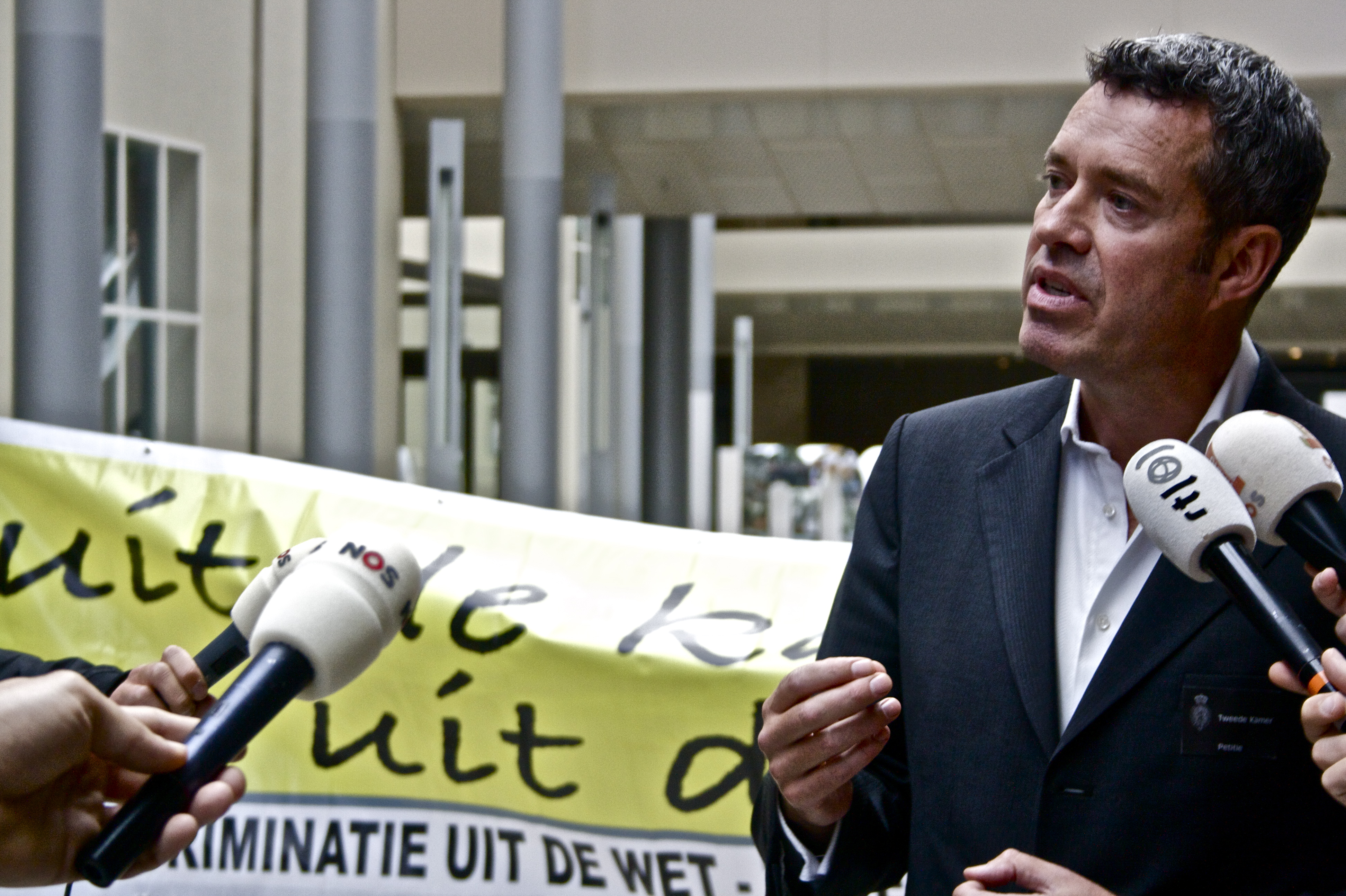 Wouter Neerings, Voorzitter COC Nederland, over de aanbieding van de petitie "Uit de kast, Uit de klas"